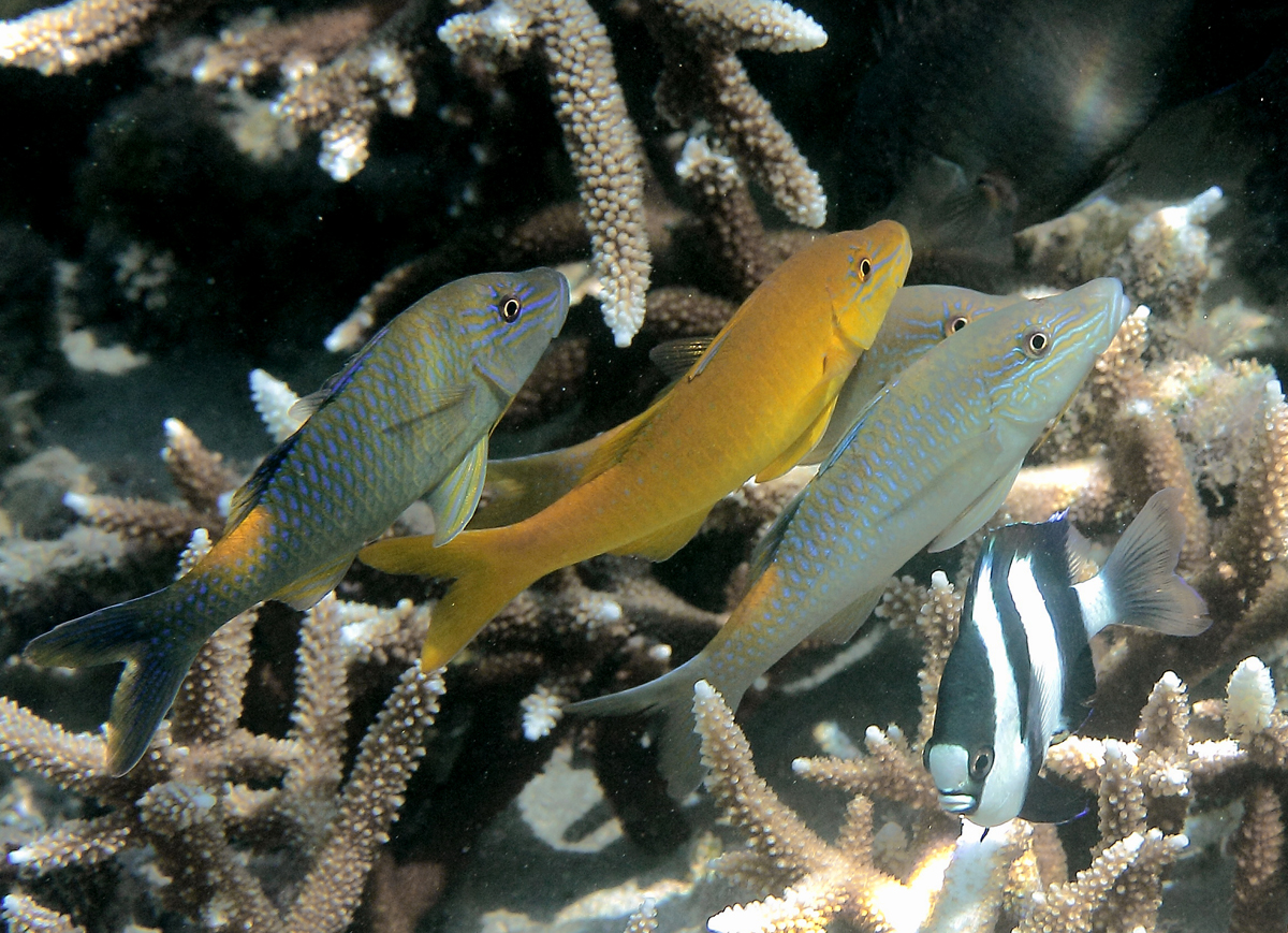 Deux rougets-barbets dorés (Parupeneus cyclostomus) dans deux livrées différentes à la Réunion.